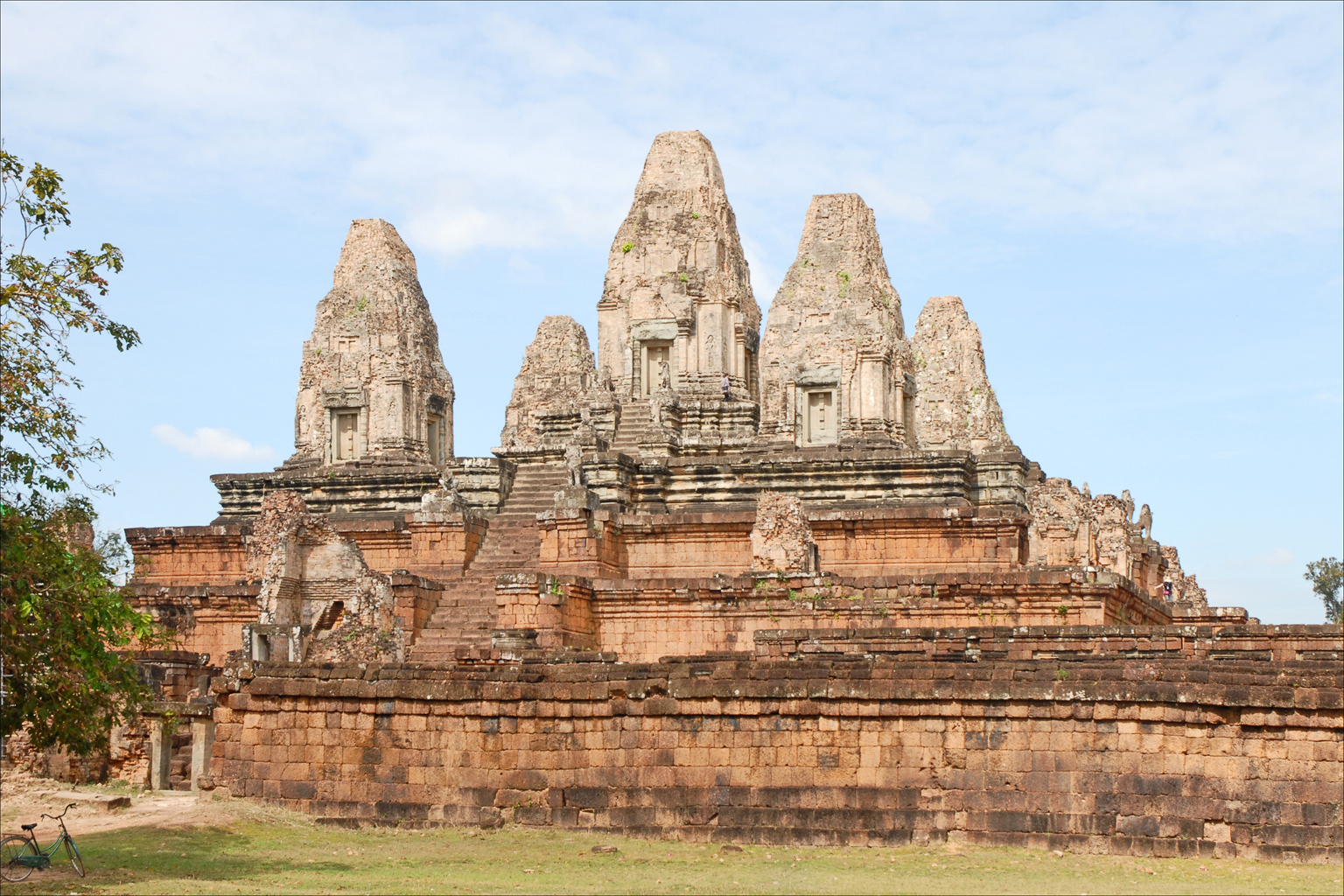 Prè Rup est le temple d'État de Rajendravarman II, construit vers 961 au sud du baray oriental sur le site d'Angkor au Cambodge. Il est inachevé. Il était consacré à Śiva et le liṅga personnel du roi, Rājendreśvara, y était vénéré. Ce roi a installé à nouveau la capitale à Angkor en succédant en 944 à Jayavarman IV qui régnait depuis Koh Ker à partir de 928. Sur la plate-forme supérieure se trouvent cinq sanctuaires dont celui du centre est le plus élevé. Article de Wikipedia